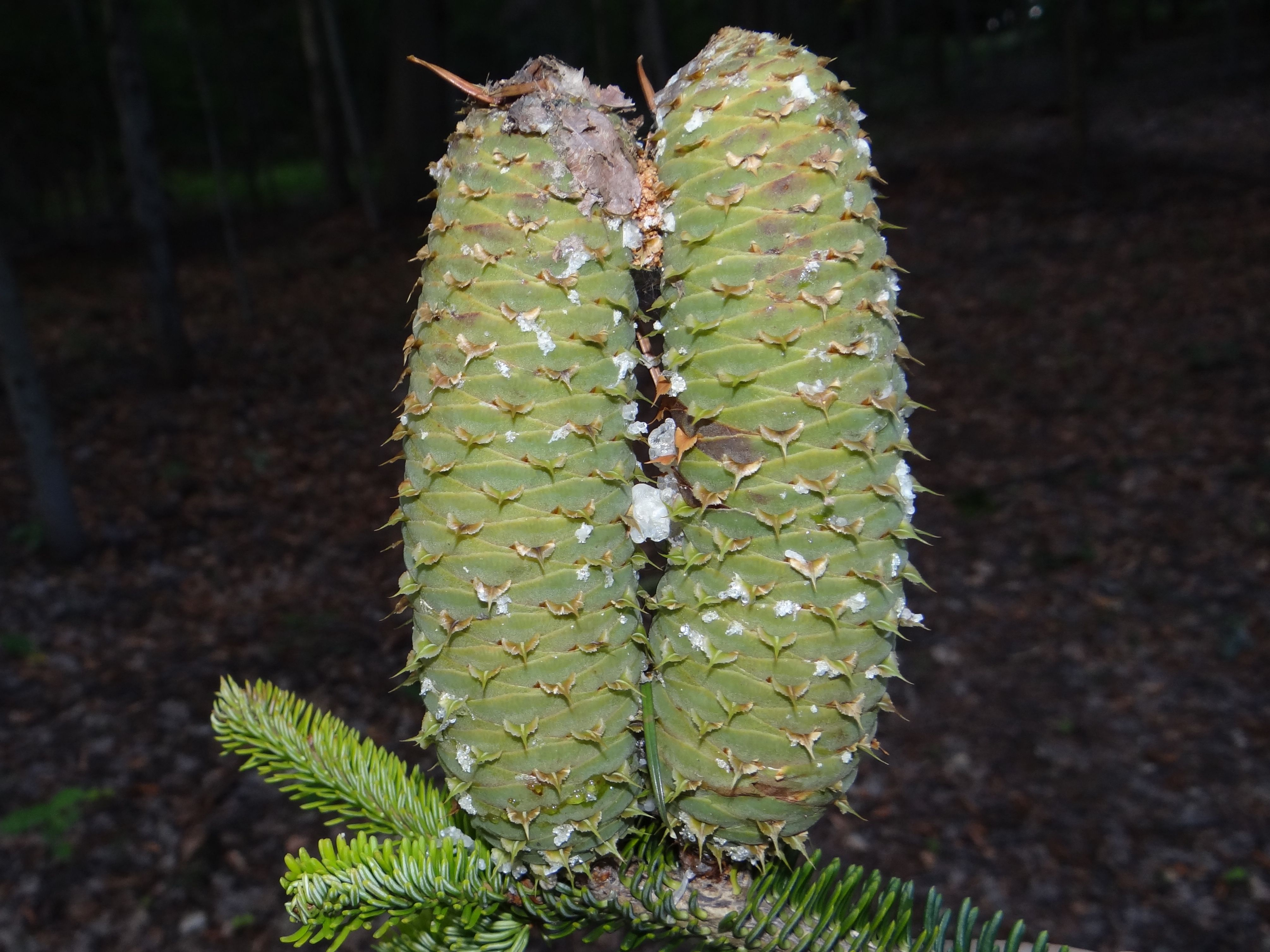 Abies alba cones